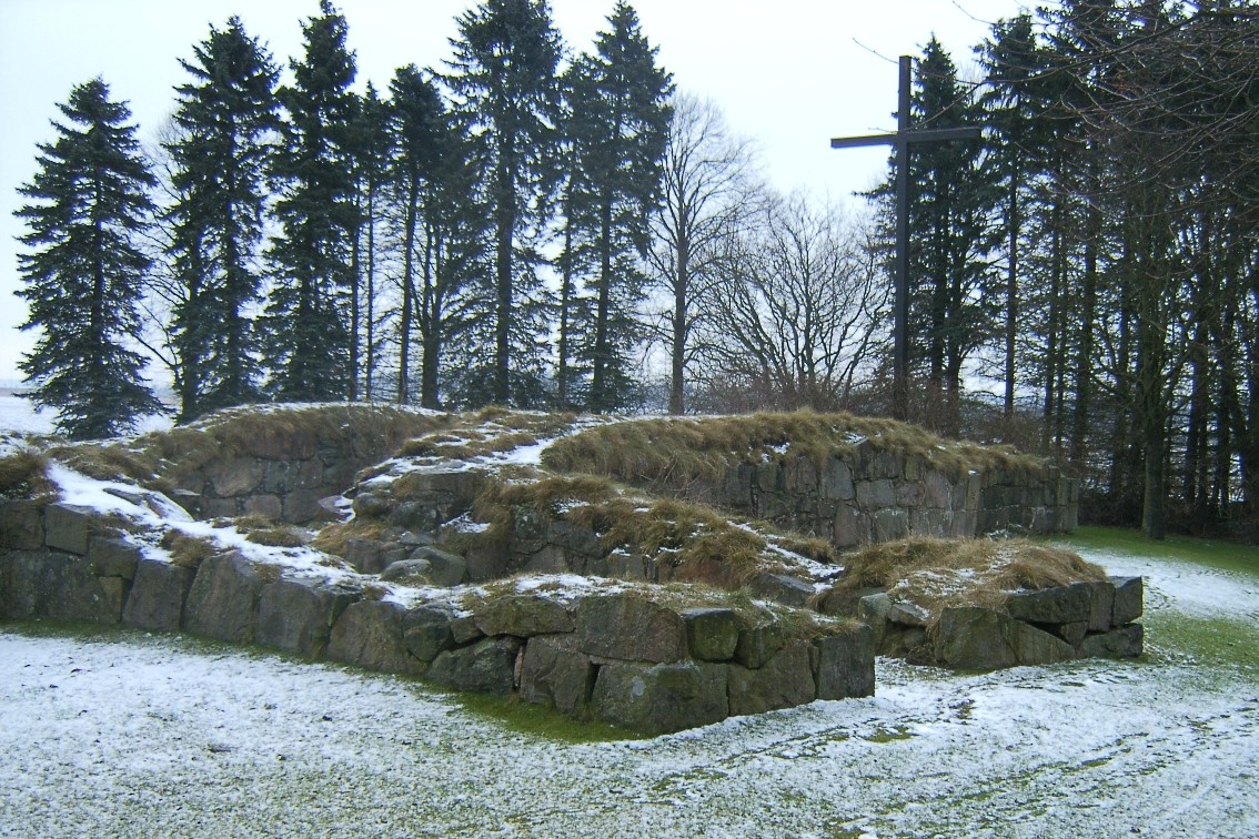 övraby kyrkoruin. . Fotograf:Gunnar Larsson